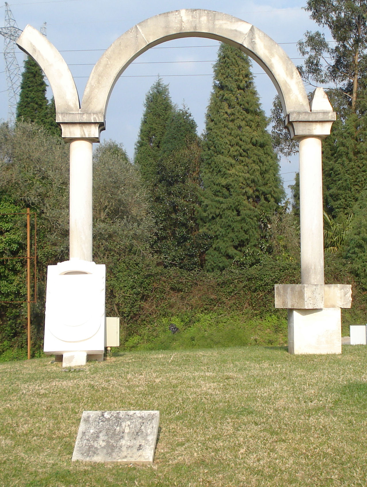 Monumento aos 1000 anos da Vacariça representando o convento